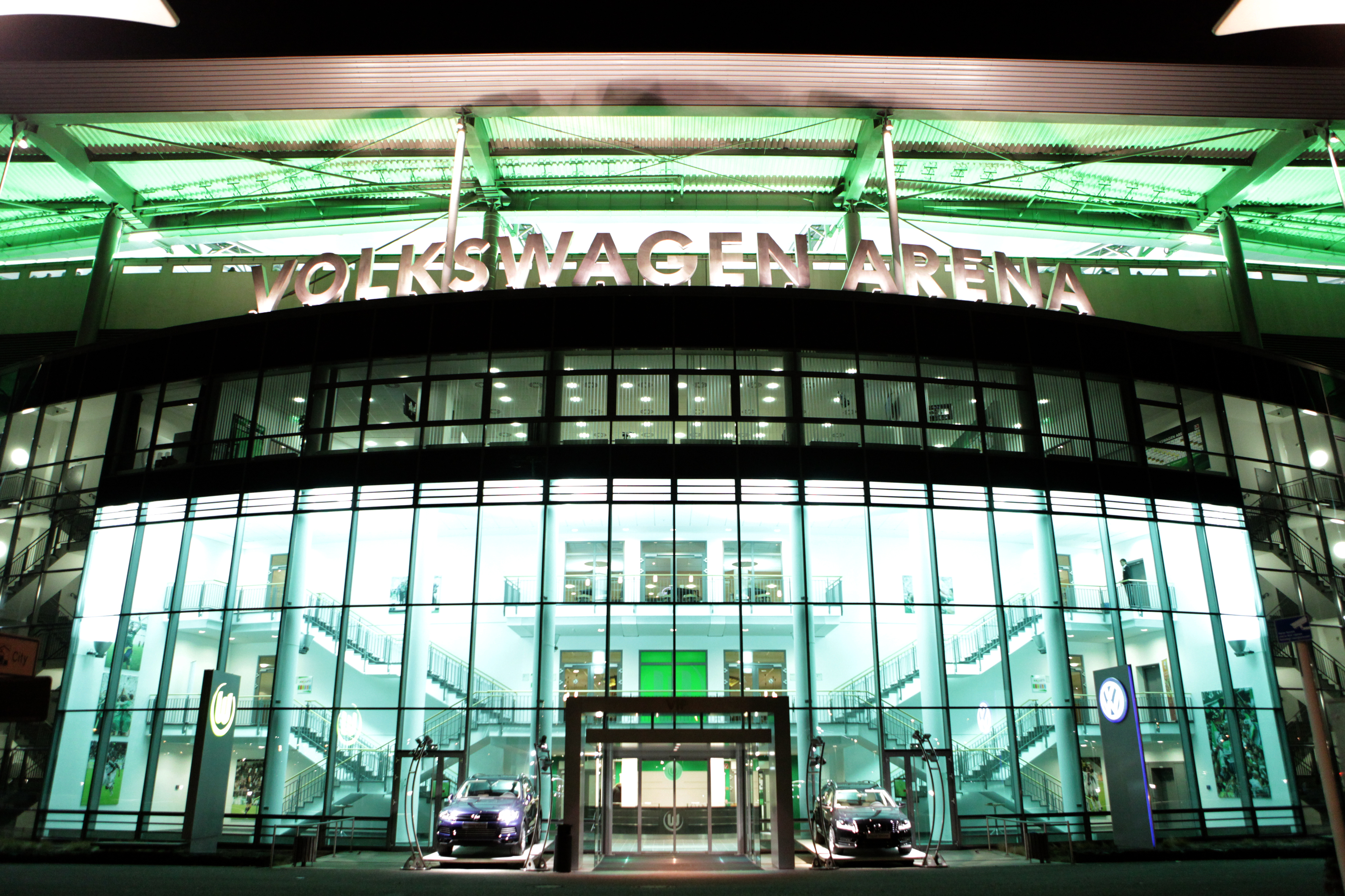 Fassade der Volkswagen Arena